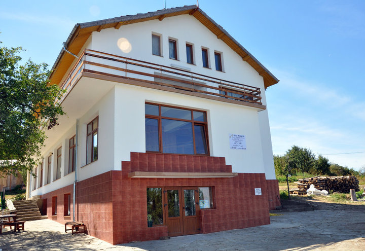 Хижата след завършения ремонт, през 2010-та